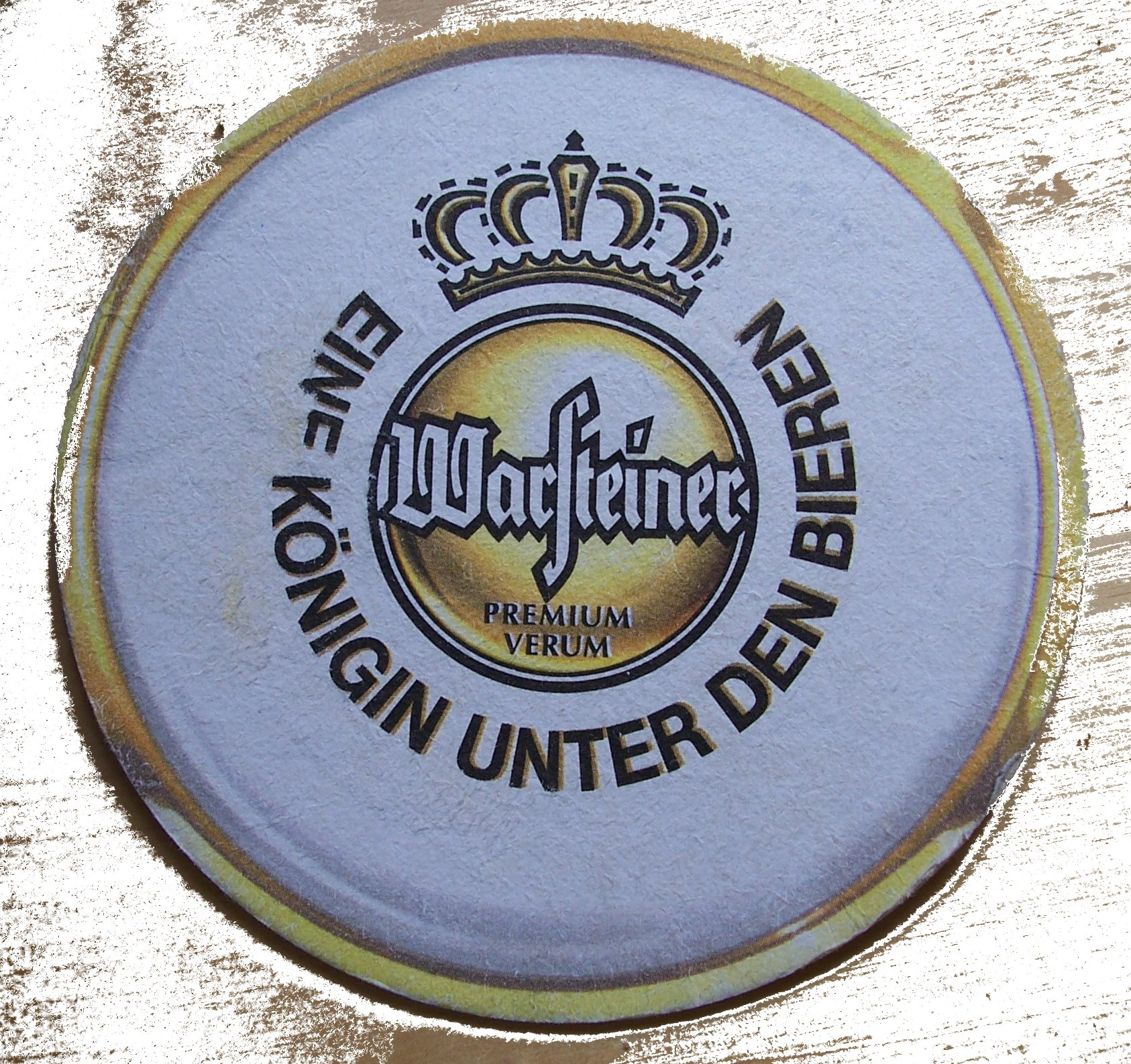 Self made picture.